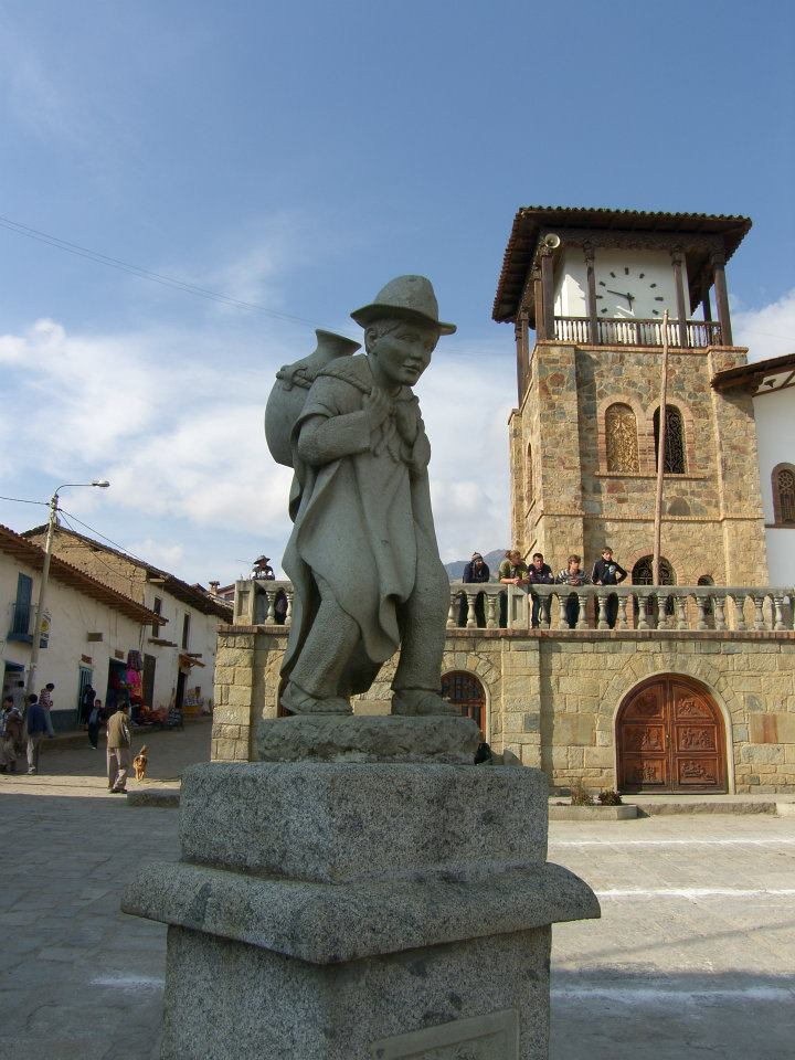 Estatua "Mankakarga" en honor a los antiguos alfareros Chacasinos, en la esquina del barrio de Atusparia.